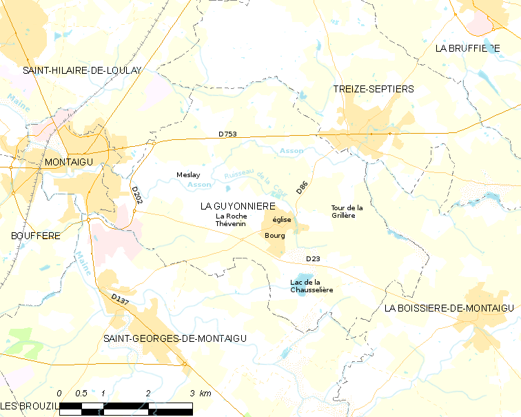 Carte de la commune de la Guyonnière avec noms de cours d'eau et de lieux à partir de Map commune FR insee code 85107